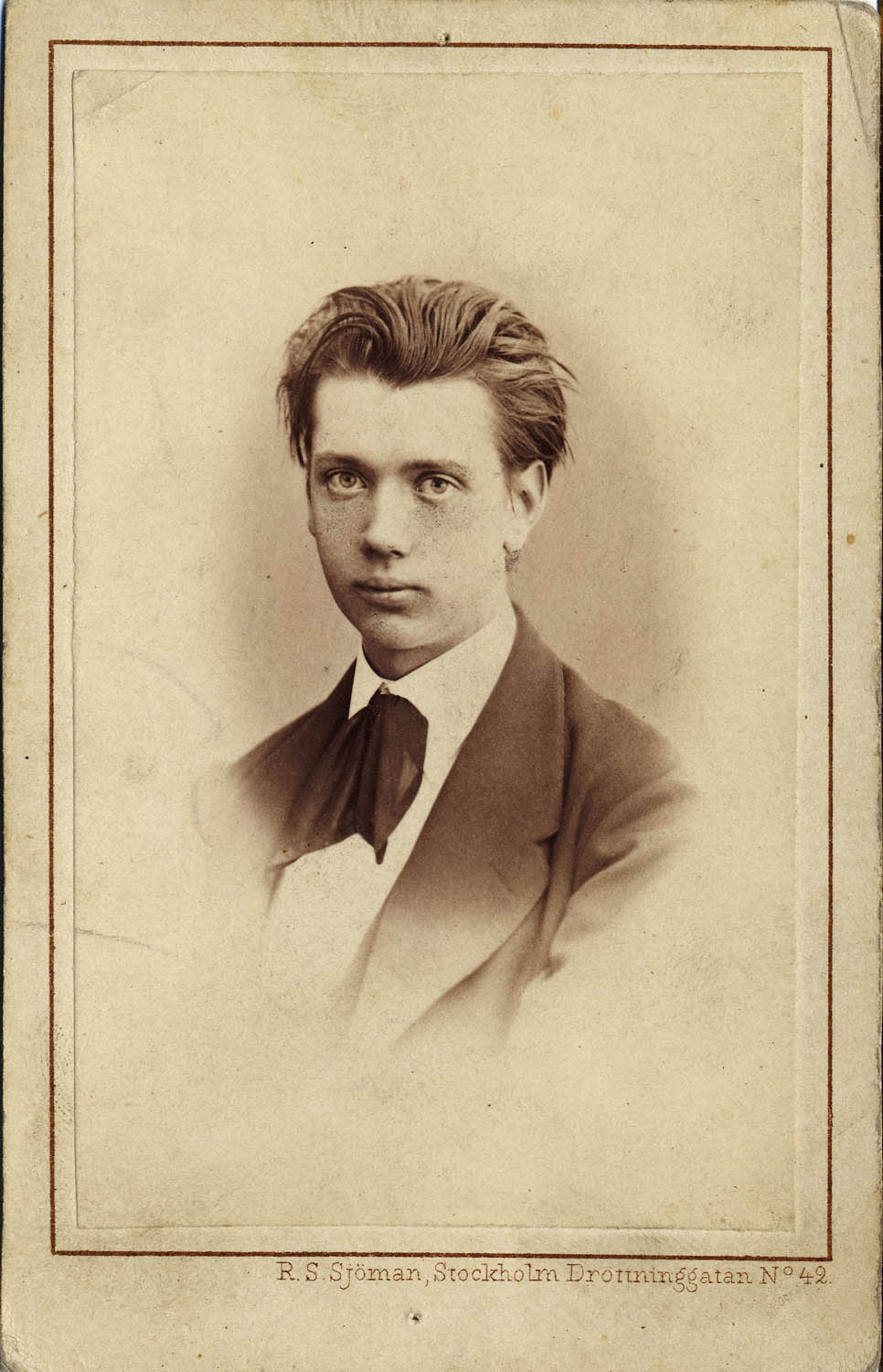 Depicted person: Julius Kronberg, Konstnär, Professor, Sverige (1850-1921)